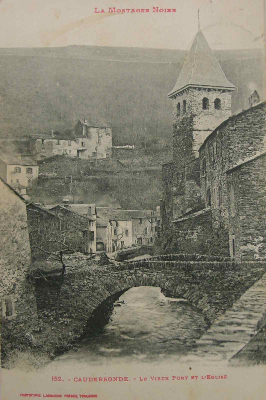 France, Aude (11), Caudebronde